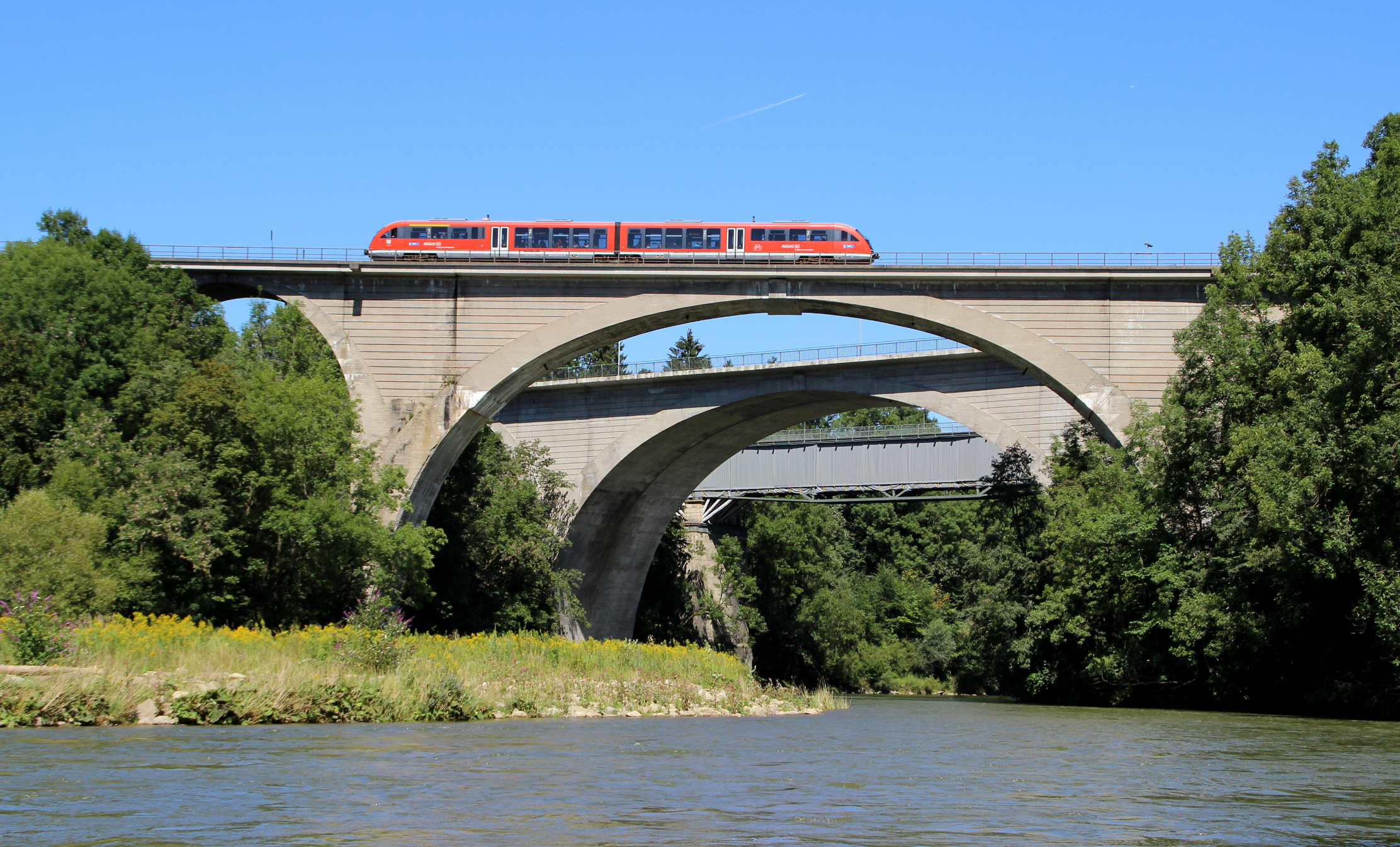 Die Oberen Illerbrücken im Sommer 2014 in Kempten Die hintere, zum Großteil aus Holz gebaute König-Ludwig-Brücke ist in diesem Bild als verhüllt zu sehen, da ihr Bestand bedroht ist.This is a photograph of an architectural monument.